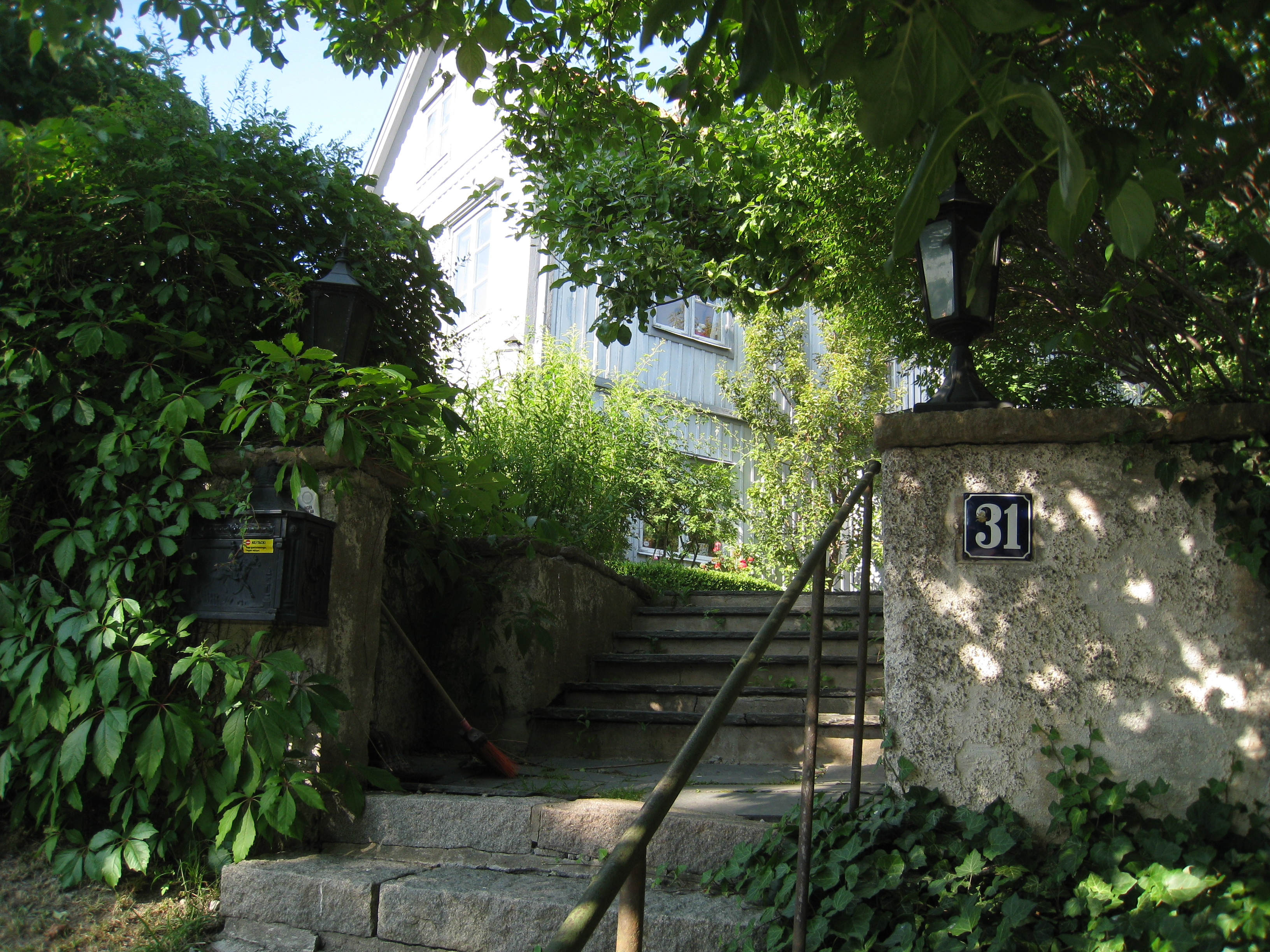 Äppelvikens gård, Äppelviksvägen 31, Bromma, väster om Stockholm. Vy med trappan upp till huset. På 1750-talet tillkom de äldsta delarna av detta hus. Namnet Äppelviken kommer från detta torp, som numera är villabostad. Äppelviksvägen leder ned till viken vid Mälarstranden.